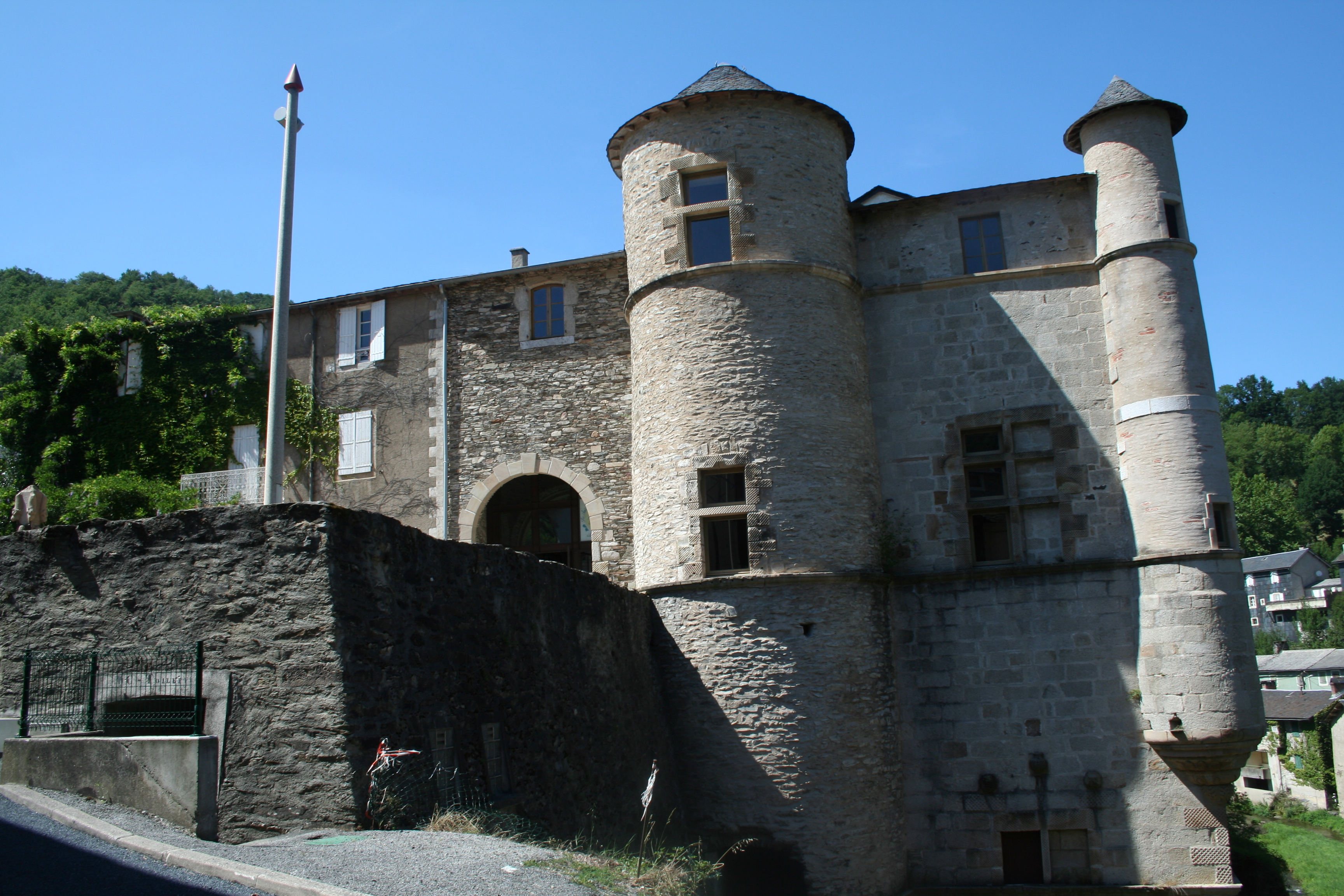 Lacaze (Tarn) - château.